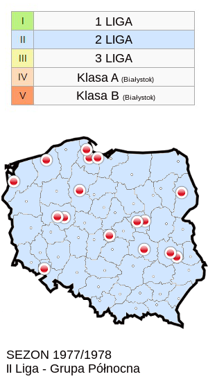 Jagiellonia w sezonie 1977/78 - mapa